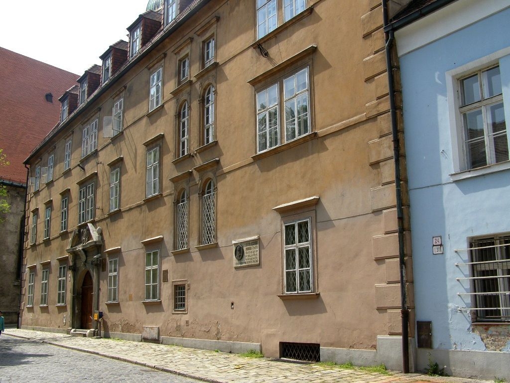 Budova bývalého Jezuitského kolégia (dnes Rímskokatolícka cyrilometodská bohoslovecká fakulta Univerzity Komenského) na Kapitulskej ulici č. 26 v Bratislave. Budovu postavili v rokoch 1629 - 1635 na podnet ostrihomského arcibiskupa Petra Pázmaňa